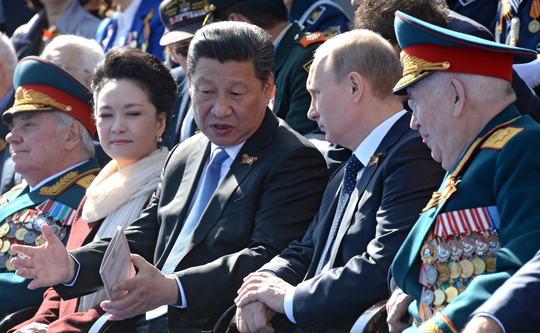 Военный парад в ознаменование 70-й годовщины Победы в Великой Отечественной войне 1941–1945 годов. C Председателем Китайской Народной Республики Си Цзиньпином.